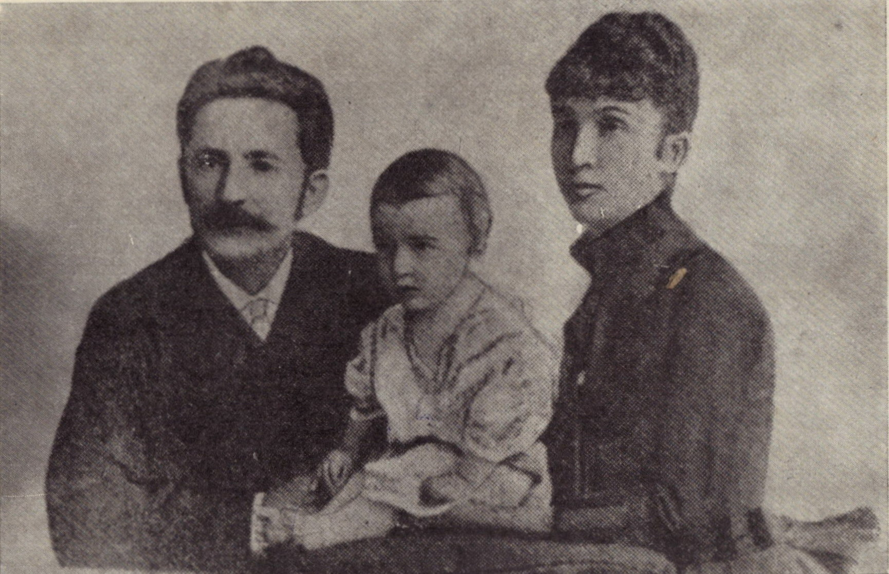 Ioan Slavici, împreună cu soția și cu fiica lor, Lavinia, în 1890.